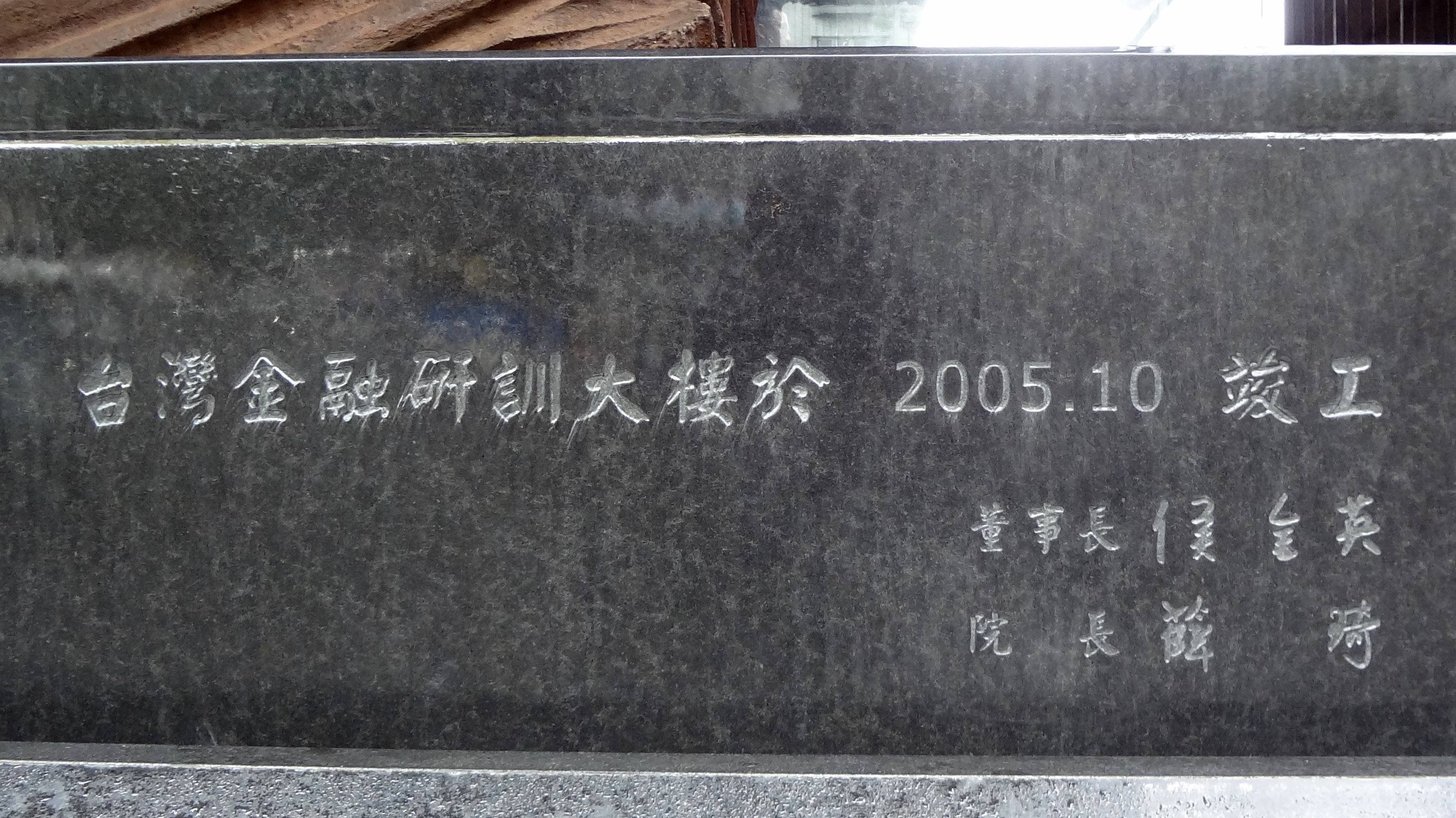 台灣金融研訓大樓竣工紀念石，位於大門右側水池。